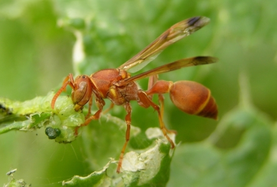 Ropalidia marginata wasp